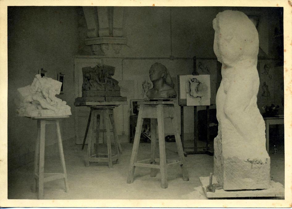 Un des ateliers de la Villa Paradisio à Nice ici occupé par le sculpteur Marcel Mayer à la suite du sculpteur Collamarini.